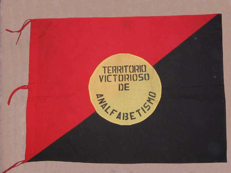 Bandera utilizada en la Cruzada nacional de Alfabetización en Nicaragua (América Central) para señalar los lugares donde se había acabado con los analfabetos.